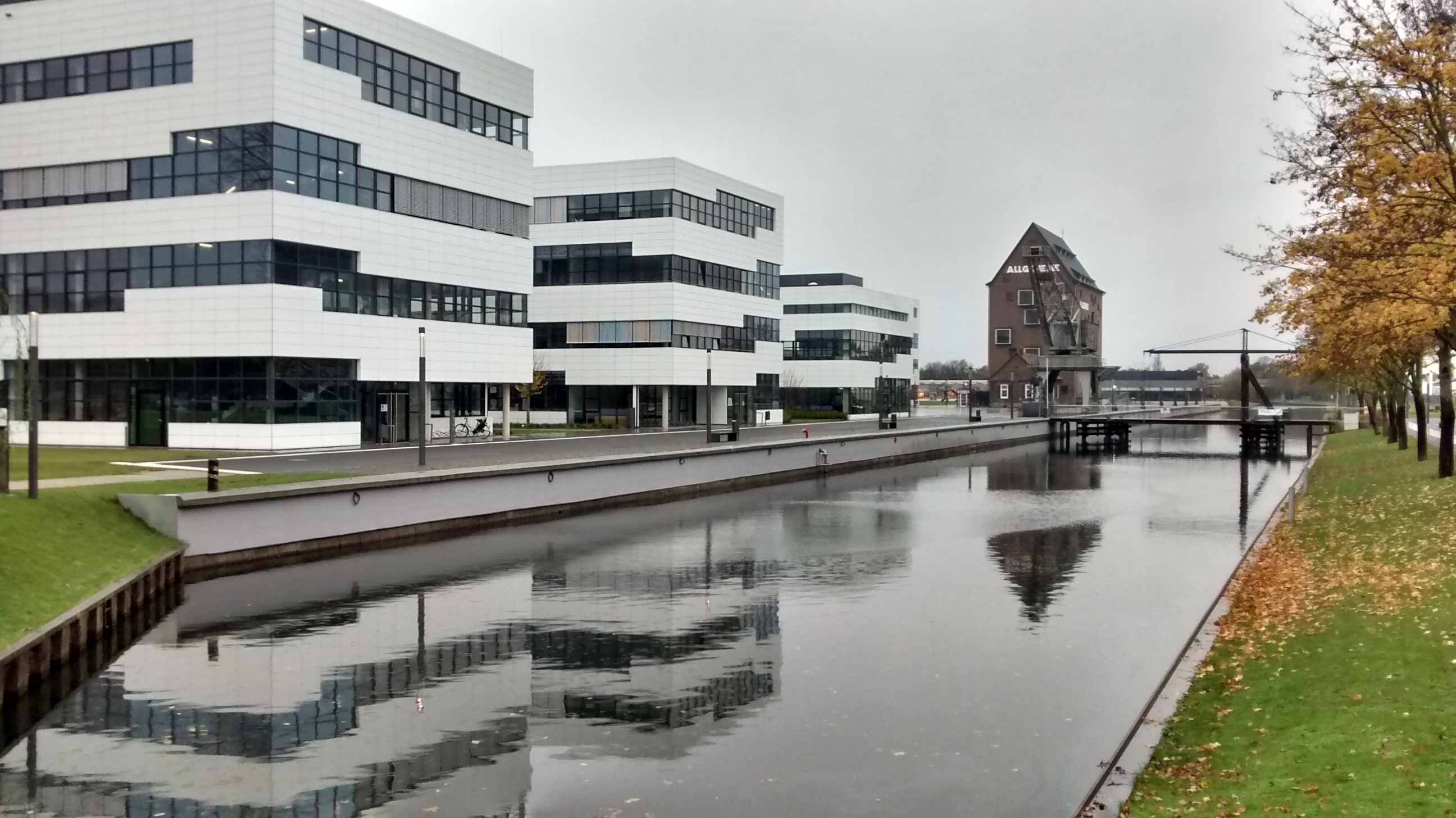 Impressionen aus Kleve vom 16. November 2014.